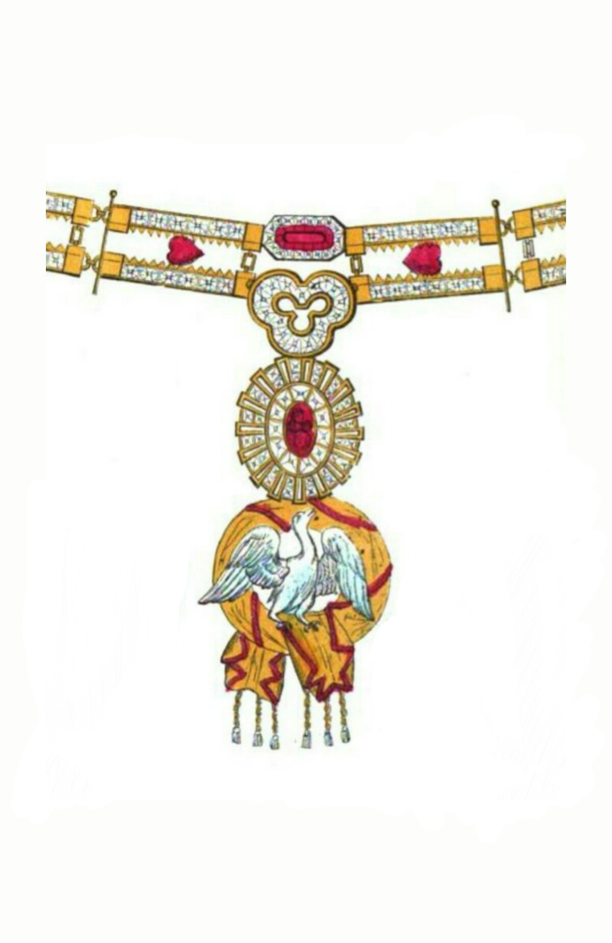 Order Łabędzia